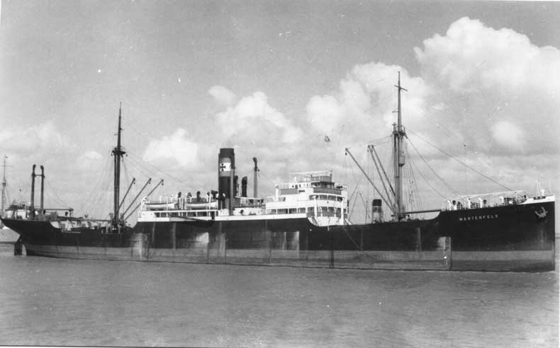 Der Frachter WARTENFELS der DDG Hansa